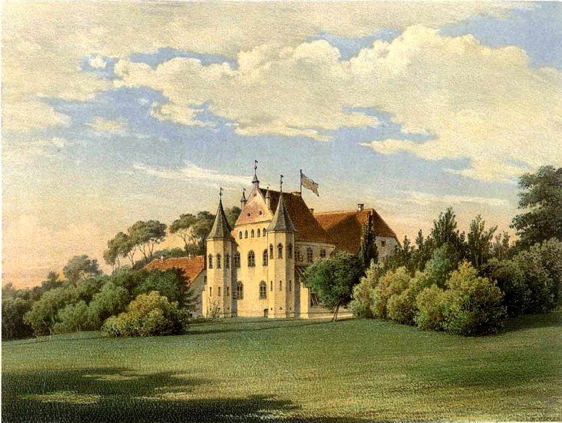 Burg Clevenow, Kreis Grimmen, Provinz Pommern